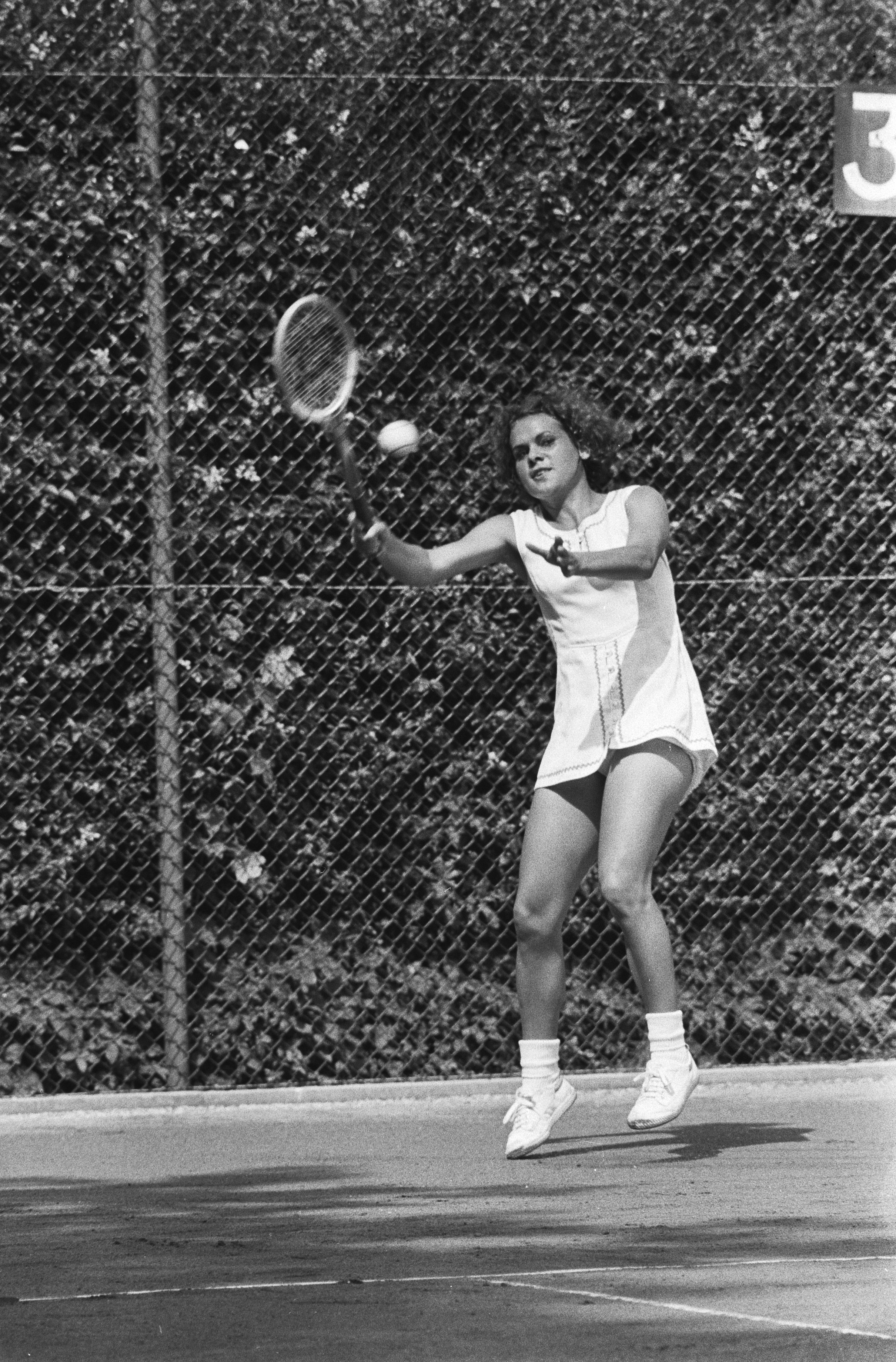 Collectie / Archief : Fotocollectie Anefo Reportage / Serie : [ onbekend ] Beschrijving : Internationale tenniskampioenschappen bij Melkhuisje te Hilversum, Evonne Goolagong in actie Datum : 26 juli 1971 Locatie : Hilversum Trefwoorden : tennis Persoonsnaam : Evonne Goolagong Instellingsnaam : Melkhuisje, 't Fotograaf : Mieremet, Rob / Anefo Auteursrechthebbende : Nationaal Archief Materiaalsoort : Negatief (zwart/wit) Nummer archiefinventaris : bekijk toegang 2.24.01.05 Bestanddeelnummer : 924-7659